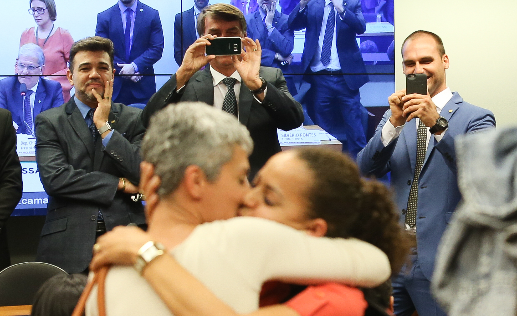 Brasília- DF 24-05-2016 Comissão de cultura da câmara. Debate sobre o ministerio da cultura e contra o golpe. Deputados Marcos Feliciano e Jair Bolsonaro aparecem a comissão e os participante fizeram um beijaço. Foto Lula Marques/Agência PT